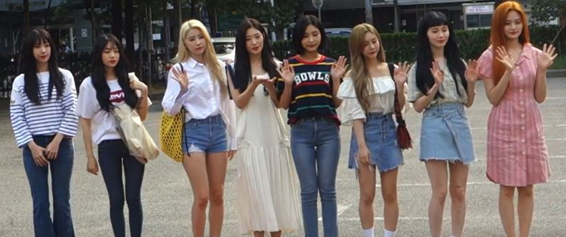 8월 10일 오전 서울시 영등포구 여의도 KBS 신관 공개홀에 KBS '뮤직뱅크' 리허설을 위해 '다이아'가 출근하고 있다.